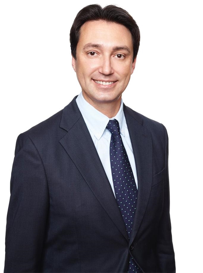 Vicente Betoret Coll, diputado nacional del Partido Popular español